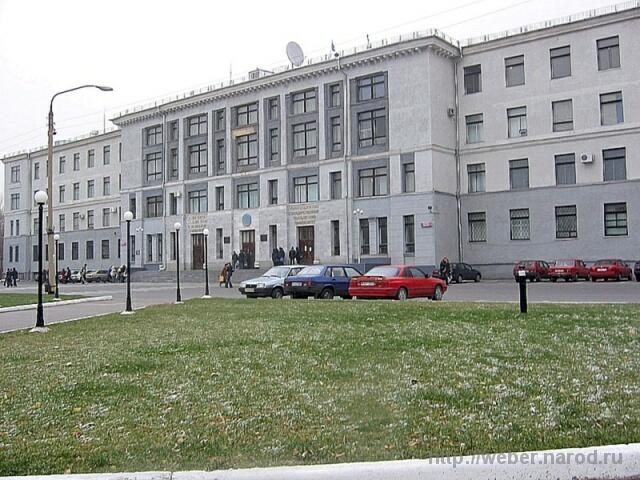 Карагандинский Технический Университет